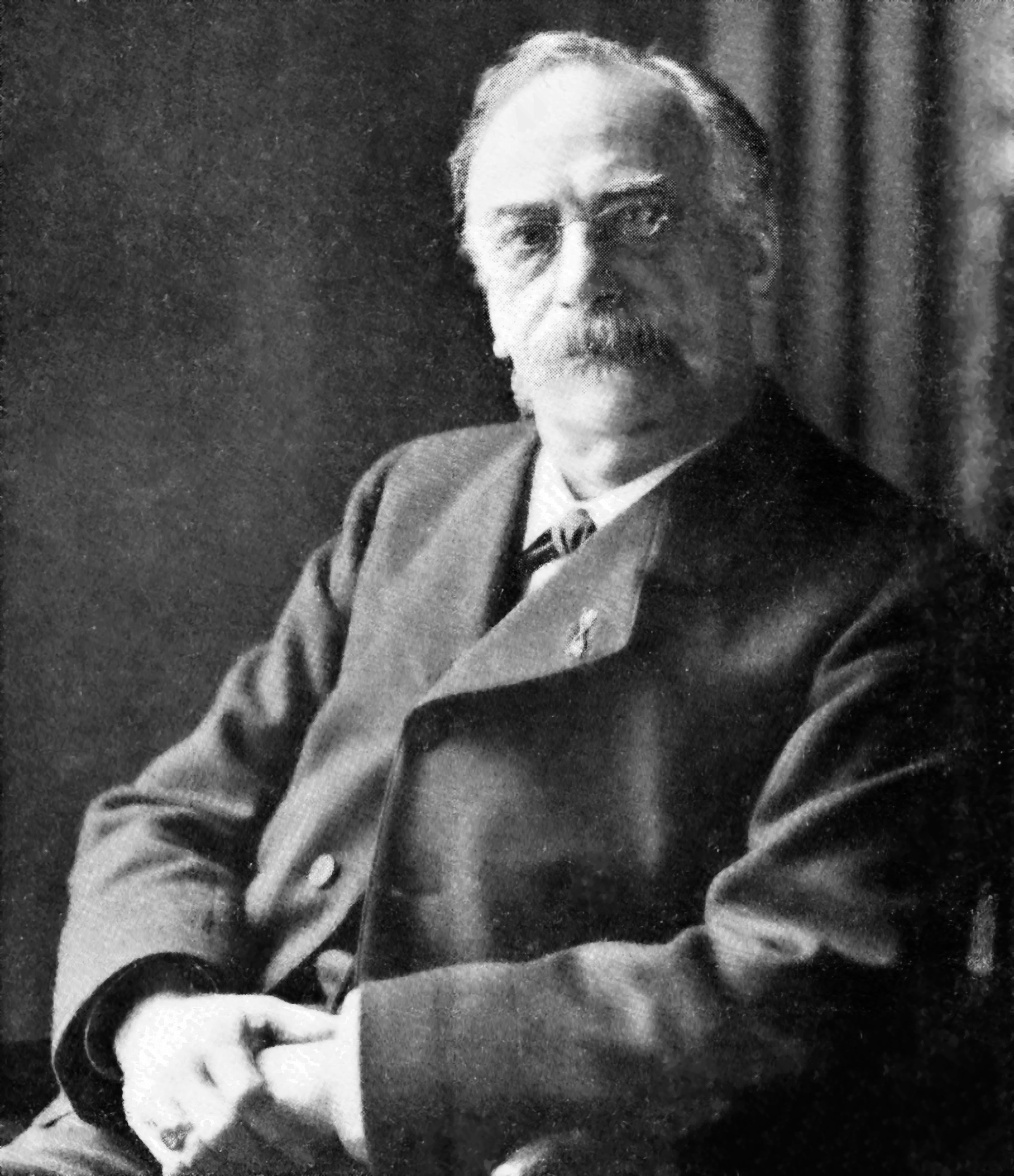 Adriën Telders